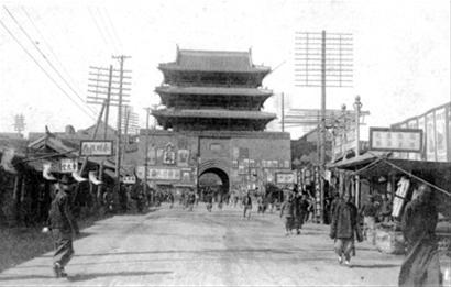 中文（中国大陆）: 沈阳小西门